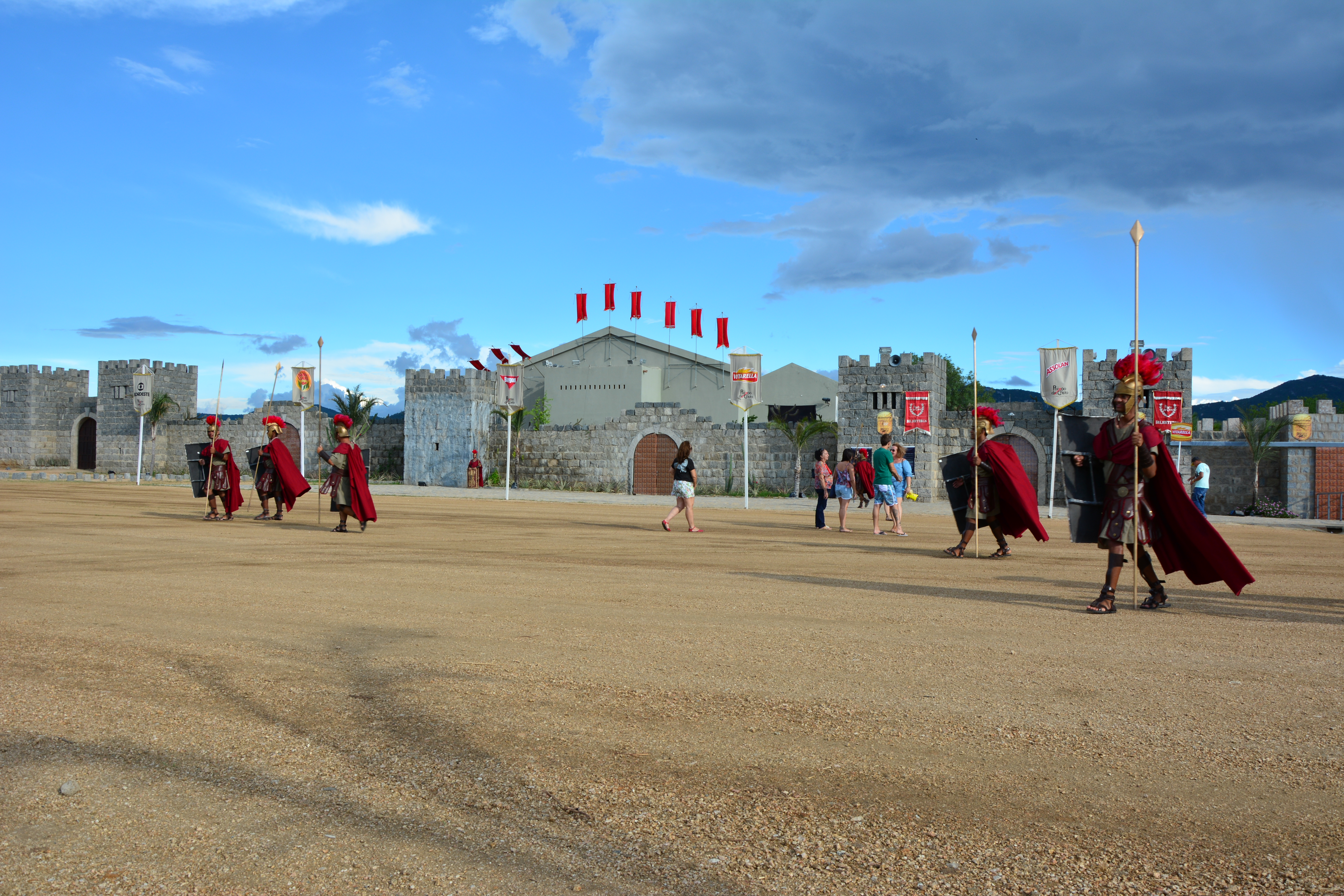 Paixão de Cristo em Nova Jerusalém - Pernambuco